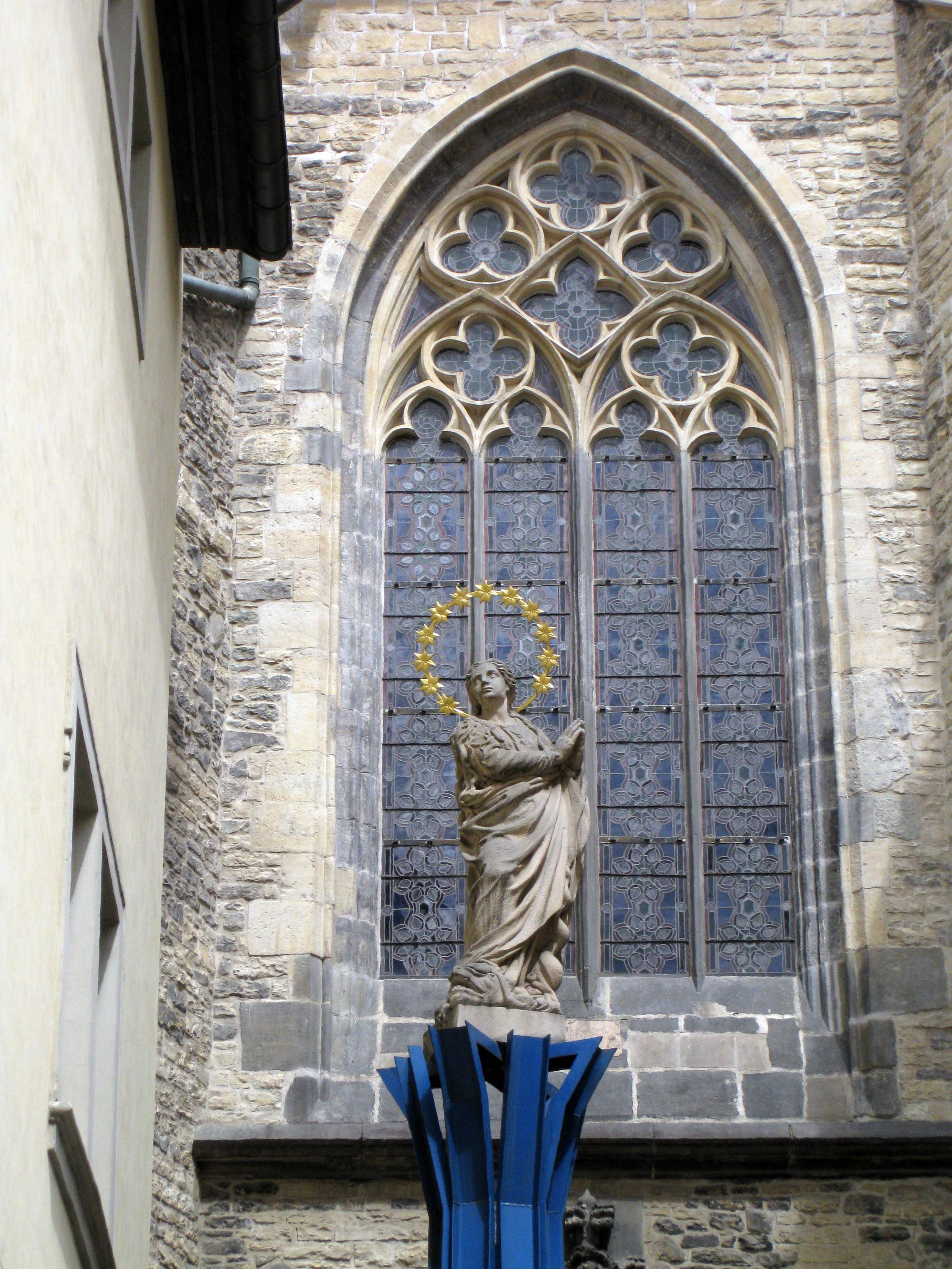 Praha 1-Staré Město, socha u Týnského chrámu.